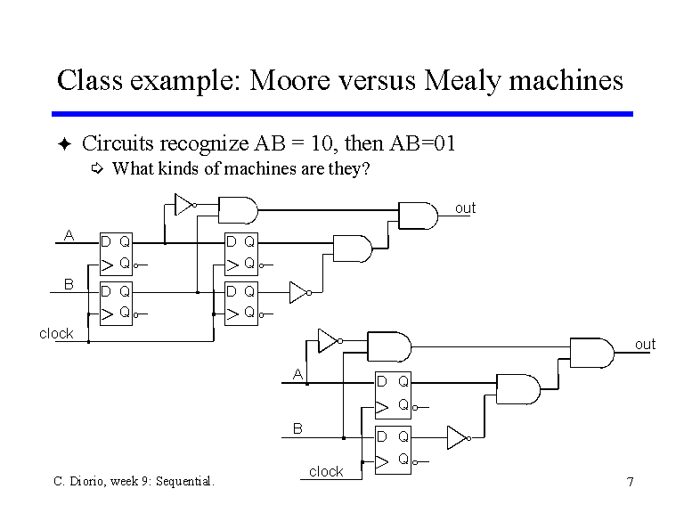 ماشین مور و مایلی